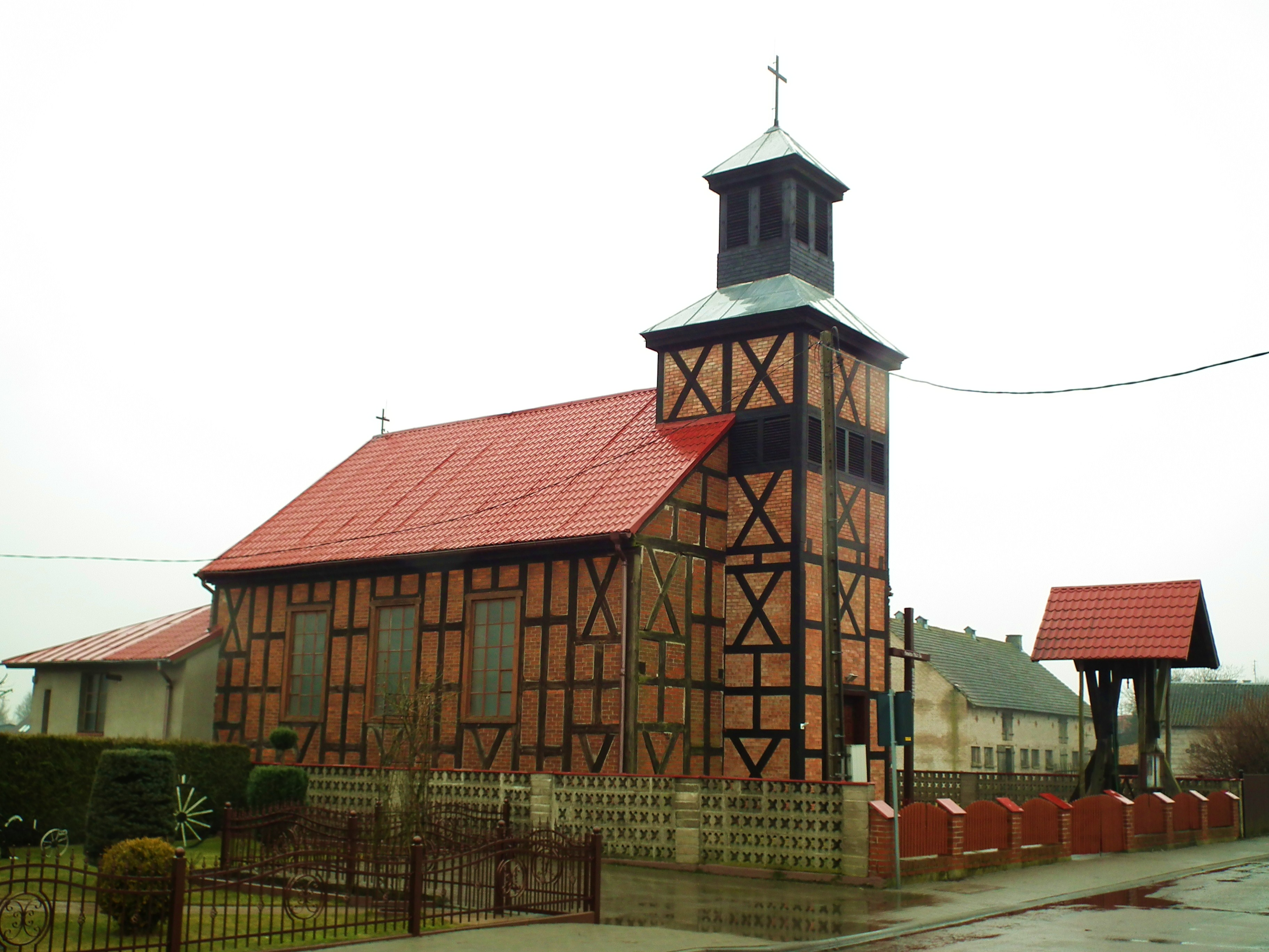 Kościół Chrystusa Króla w Kleszczynie.